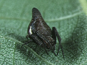 female Eriovixia pseudocentrodes from Okinawa.